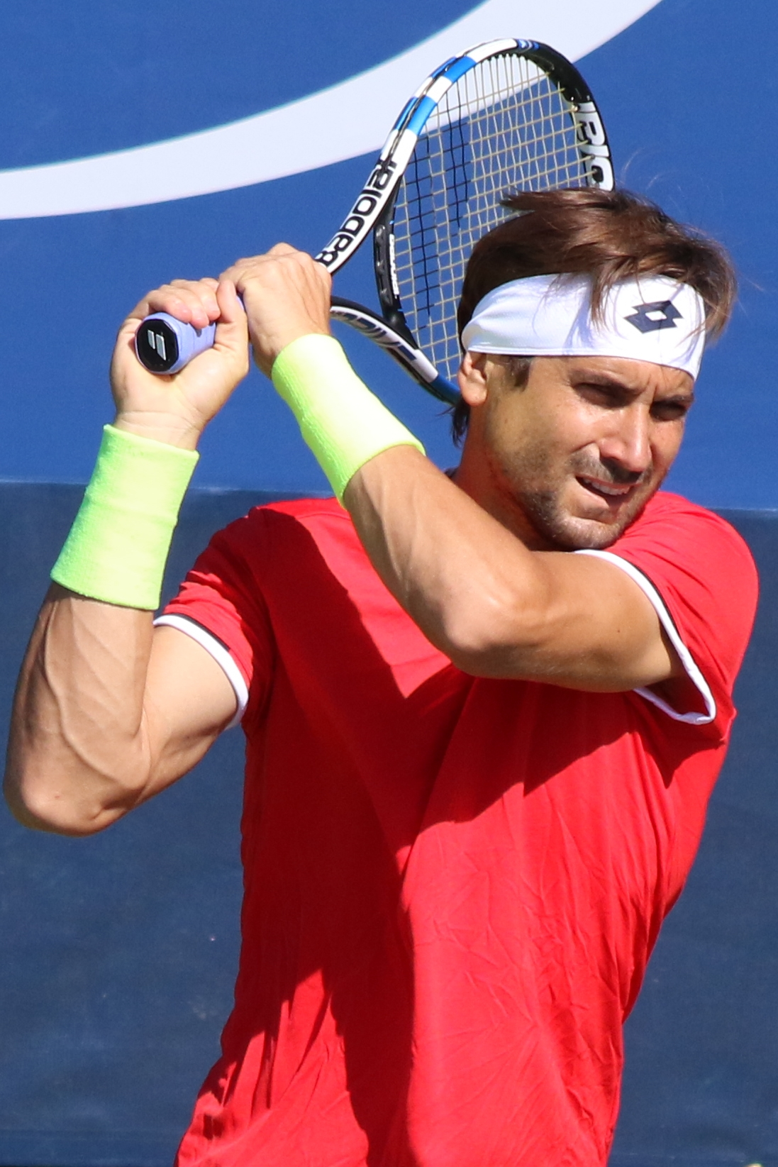 Ferrer US16 (21)